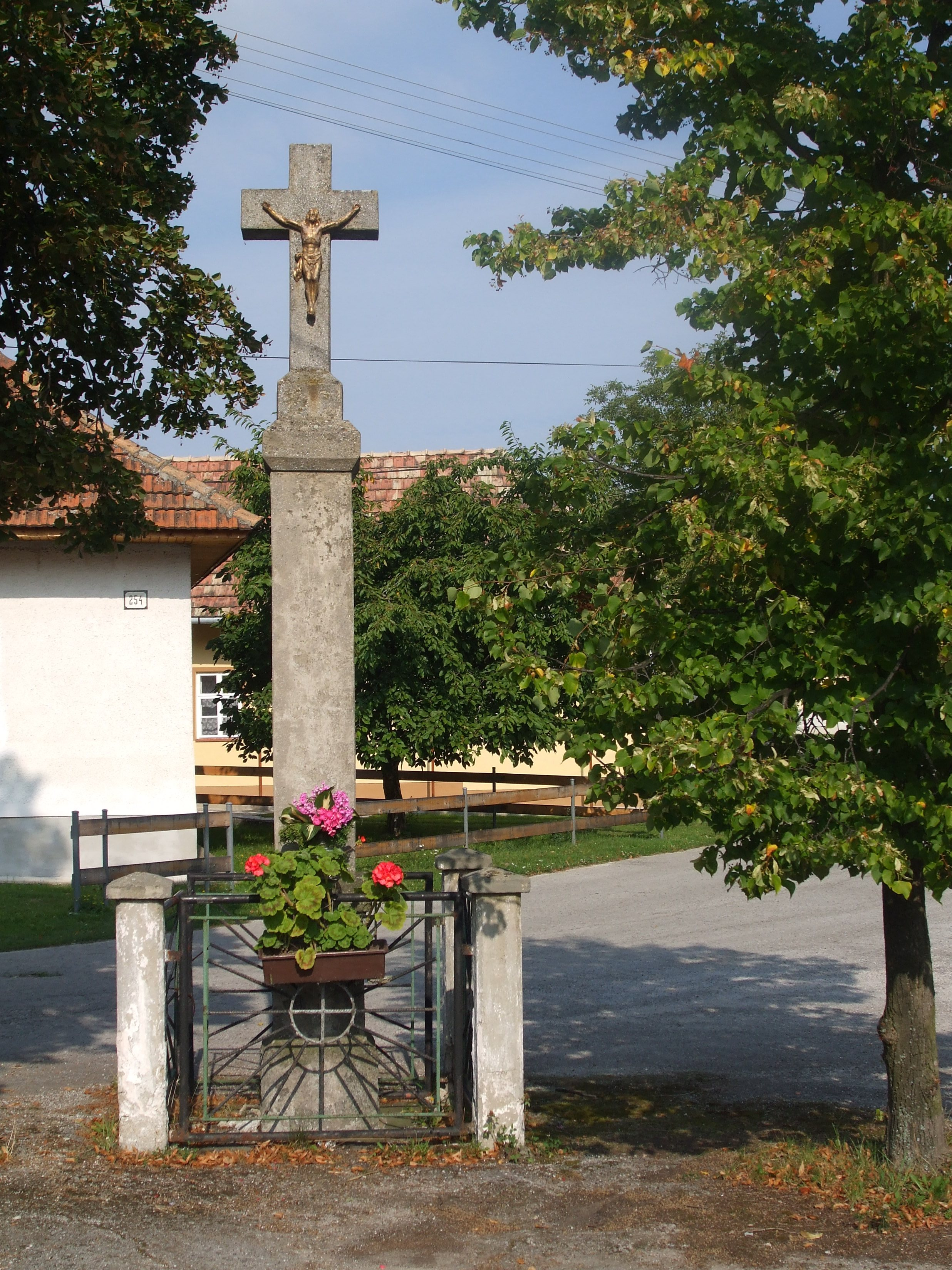 Kamenný kríž postavený v roku 1850.